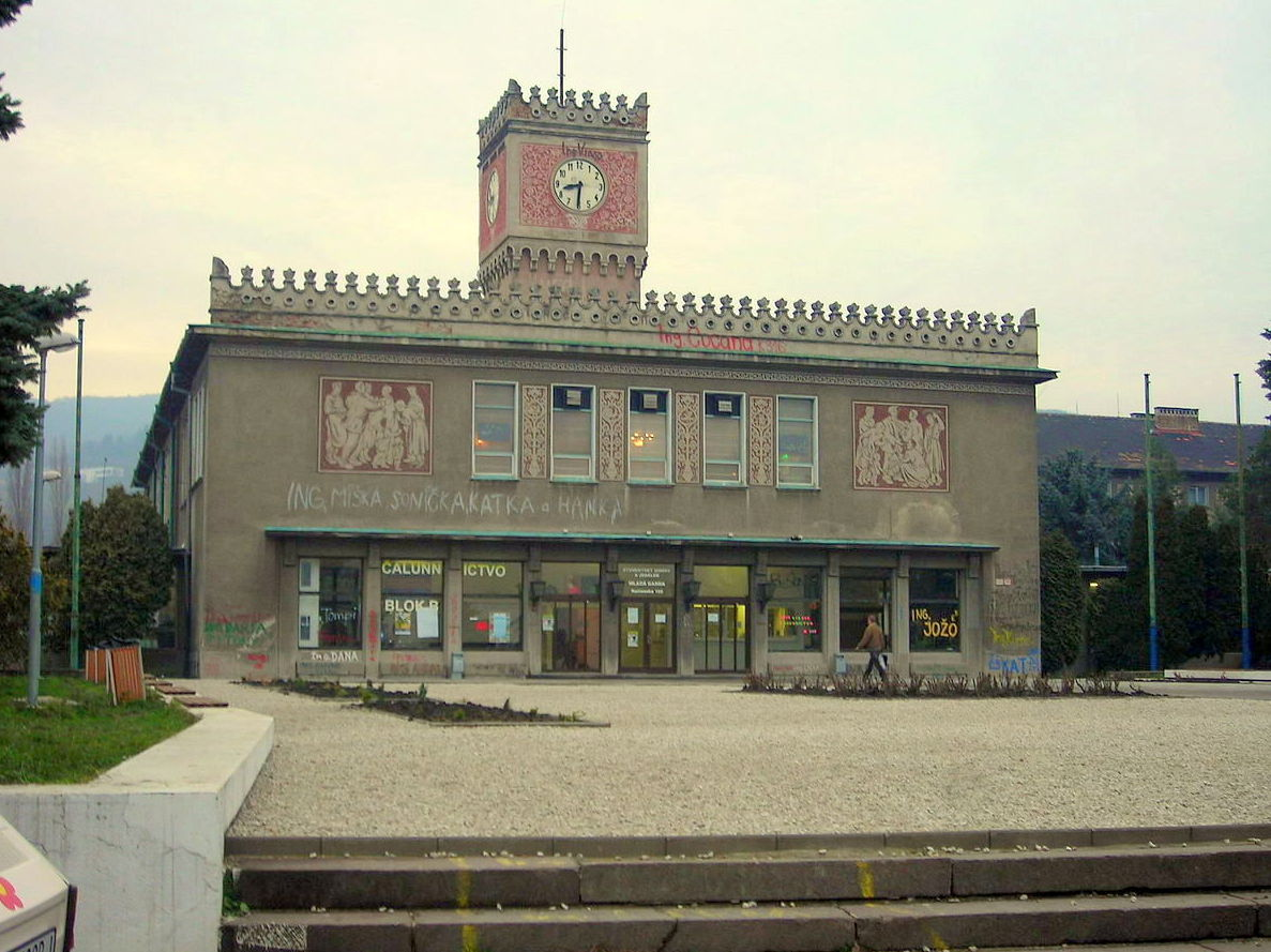 mlada garda